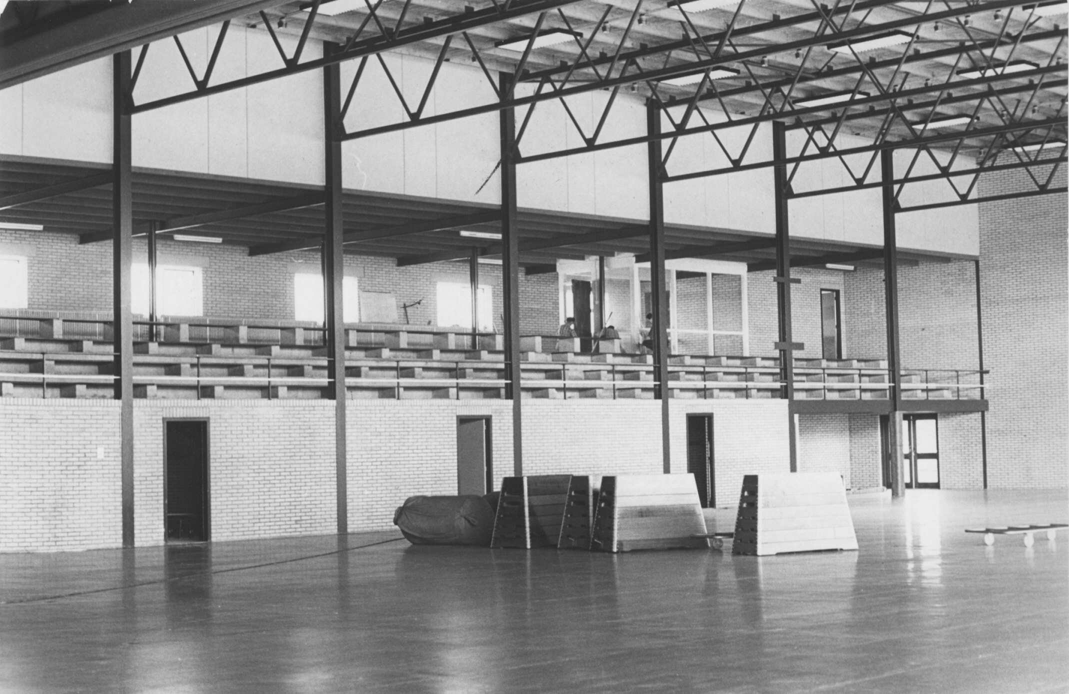 De Sporthal VoCASA